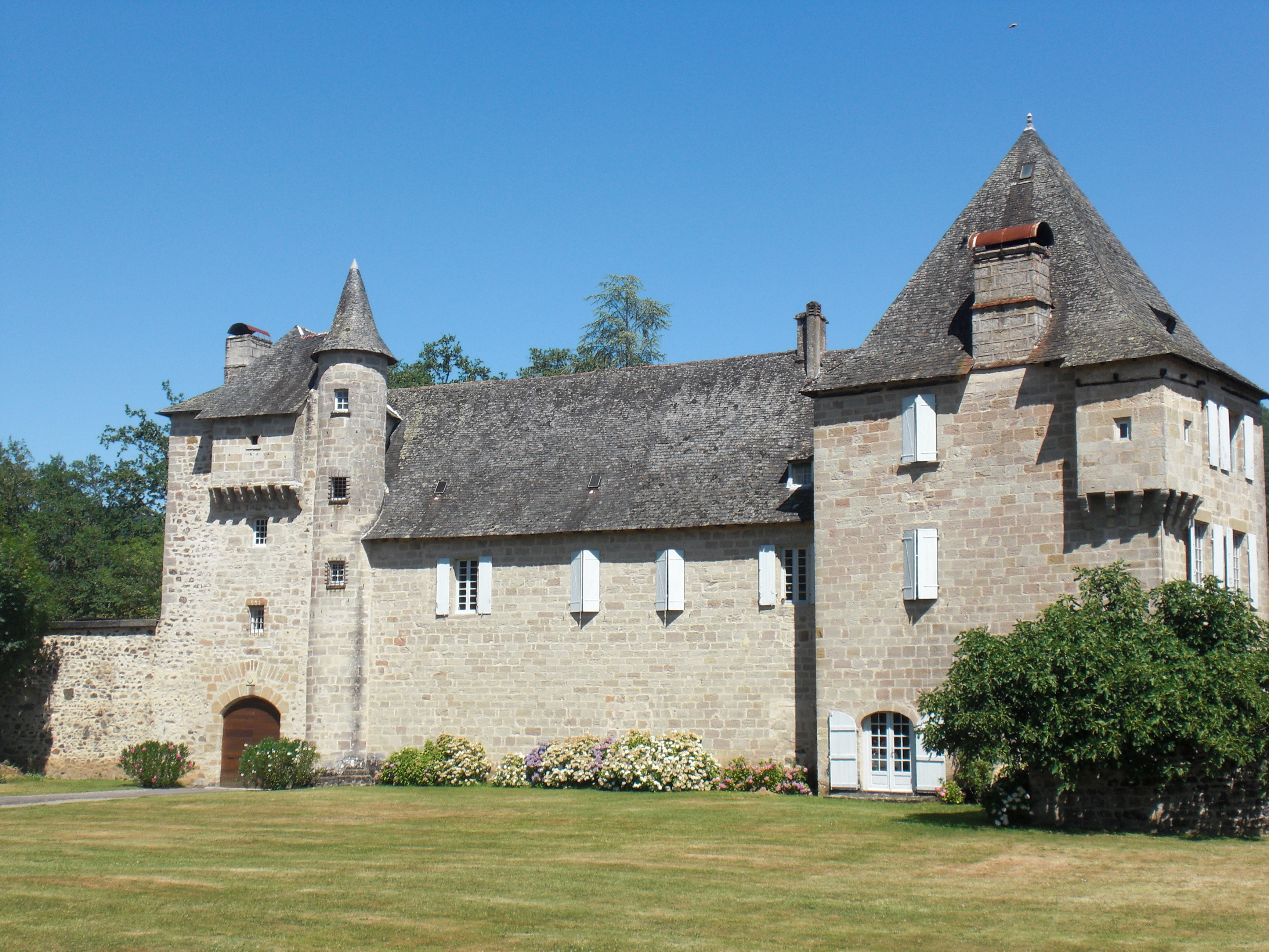 Château d'Estresse, (Inscrit, 1971) Visite sur rendez-vous par le propriétaire (château privé). Très belle vue sur la Dordogne depuis le jardin du château. .